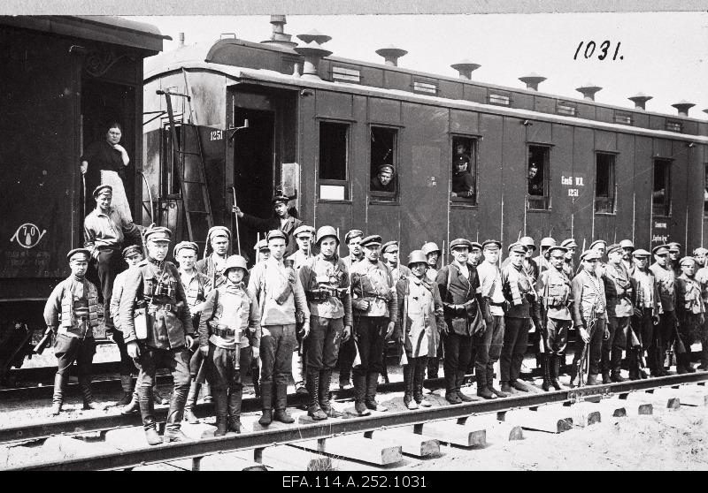 "Soomusrongi Mari" (Melanie Laid) Vabadussõjas laiarööpmelisel soomusrongil "Kapten Irv".